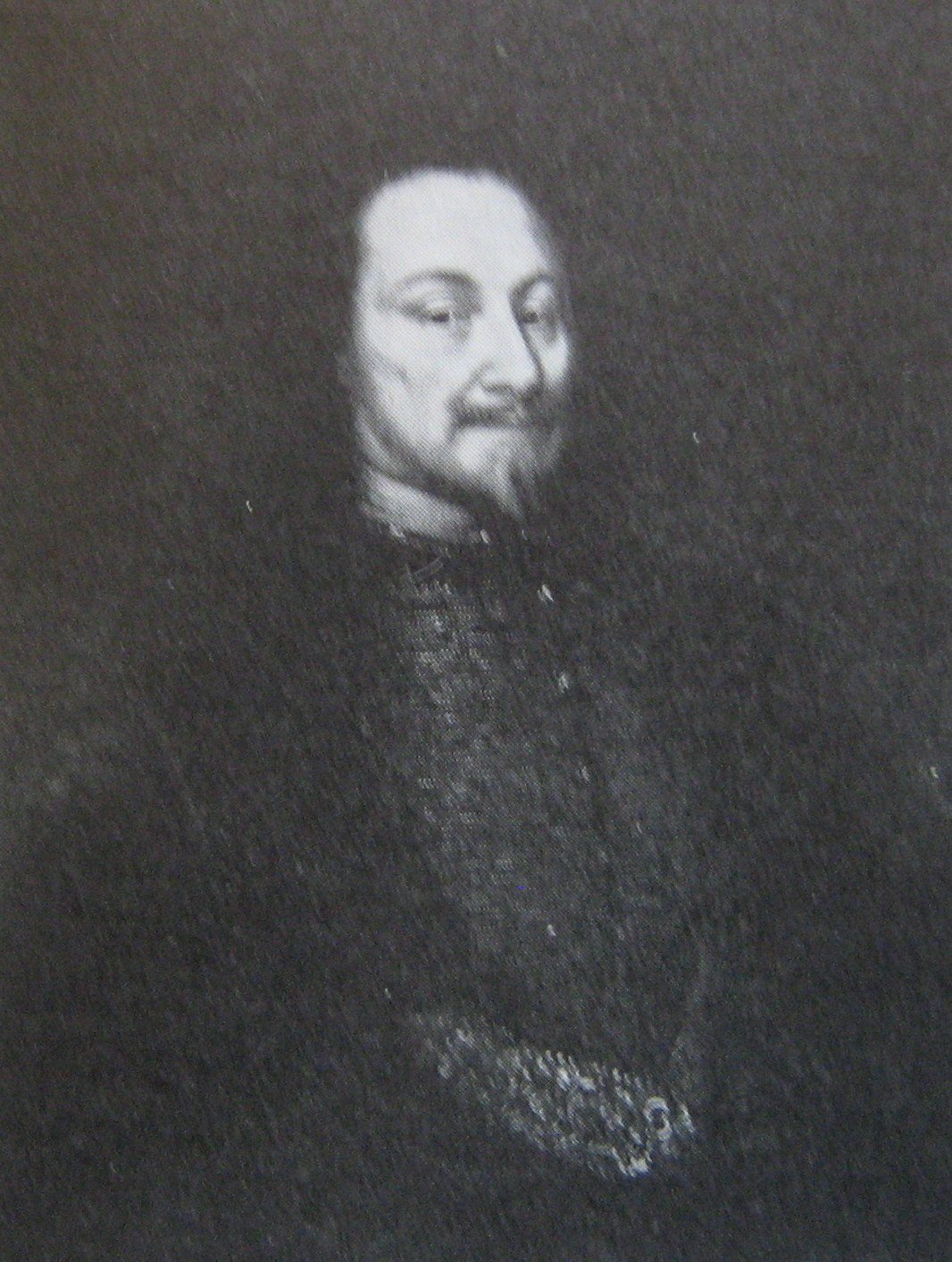 Gustaf Tungel